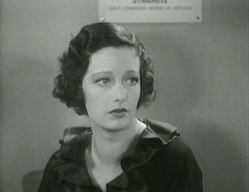 La actriz Polly Ann Young en una escena del filme El hombre de Utah.